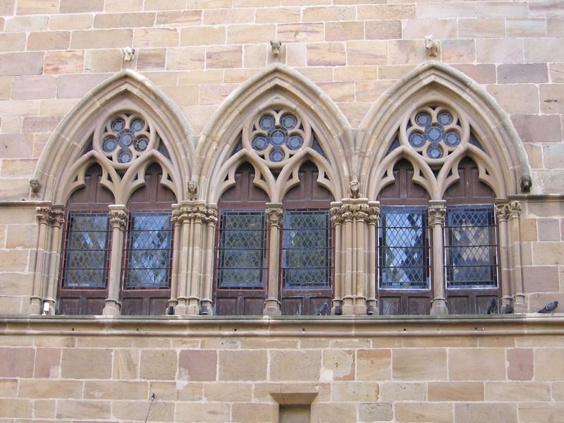 Maison du Grand Fauconnier (détail). Ville de Cordes .